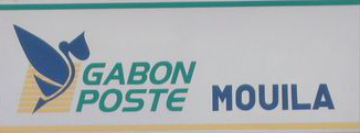 Enseigne du bureau de poste de Mouila, au Gabon 2006